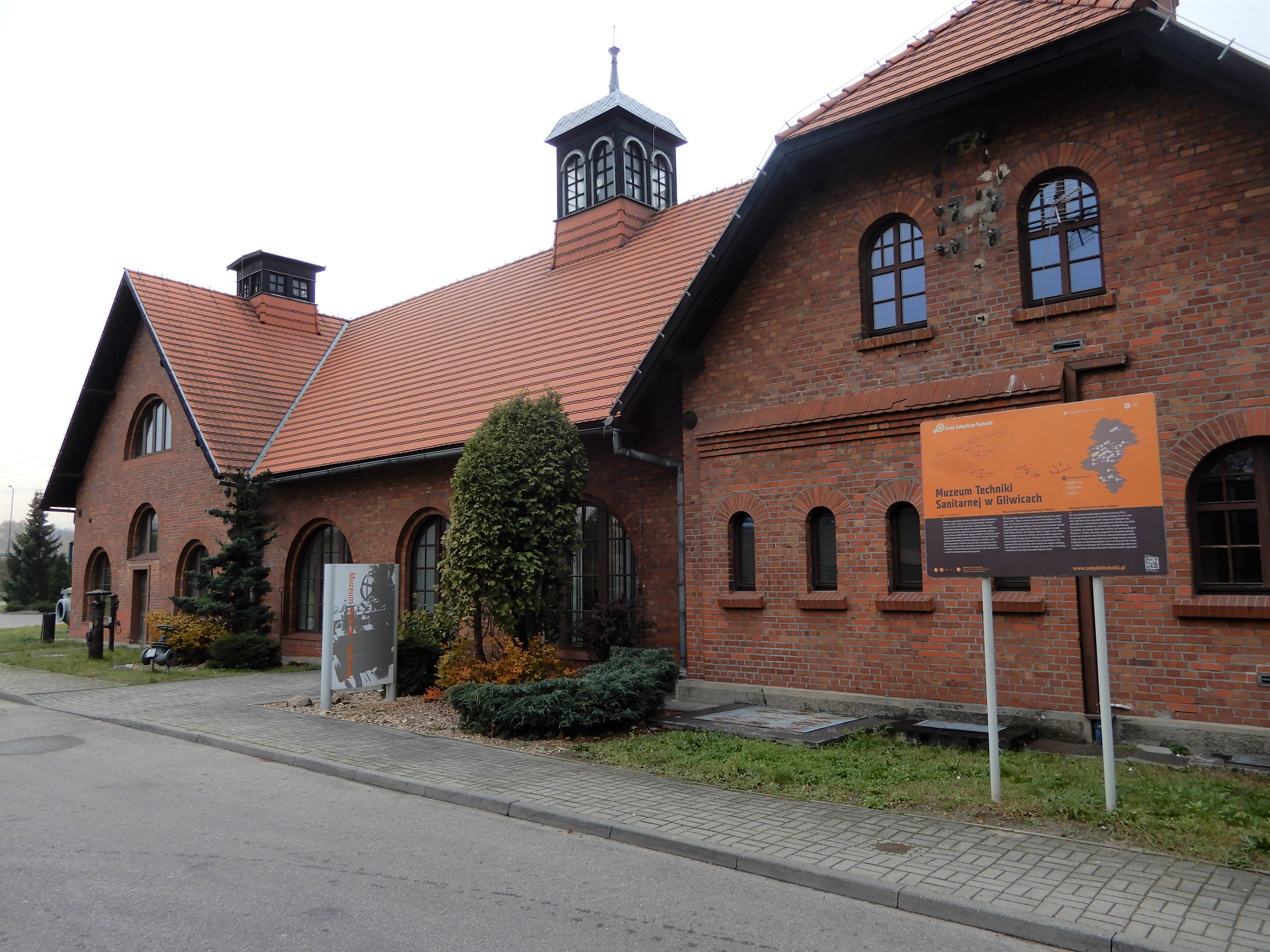 Muzeum Techniki Sanitarnej w Gliwicach